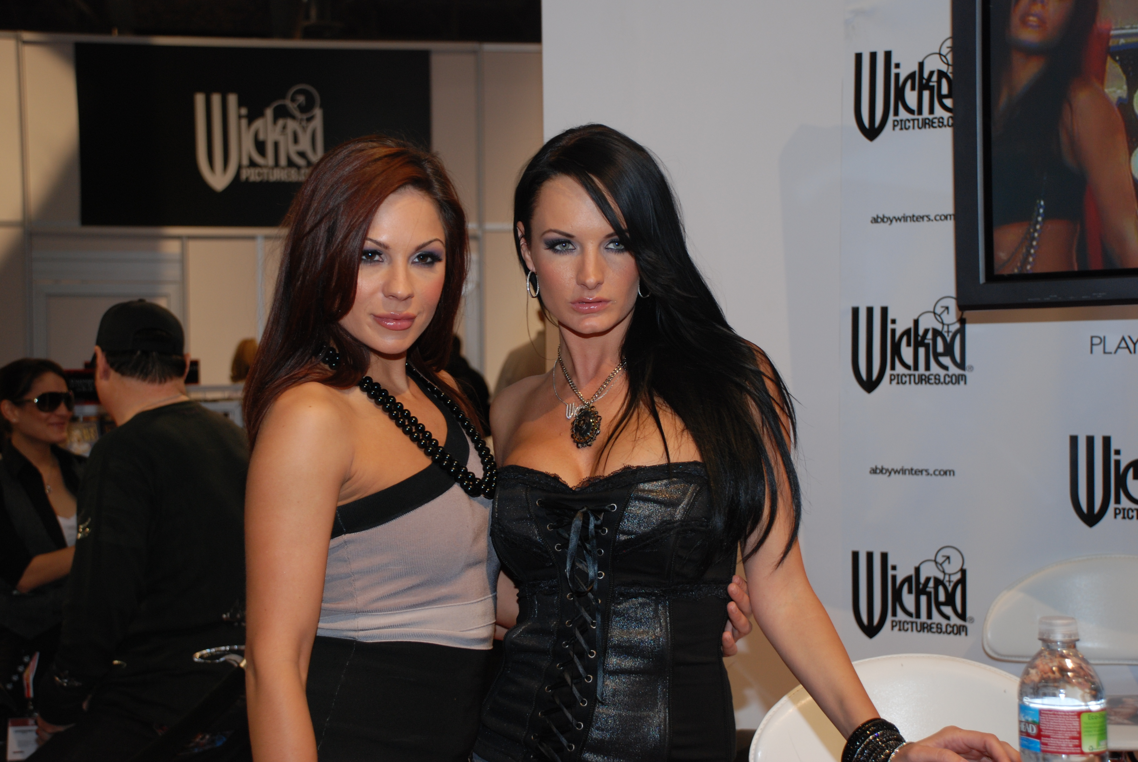 AEE2009_Jan11_Nikon 837